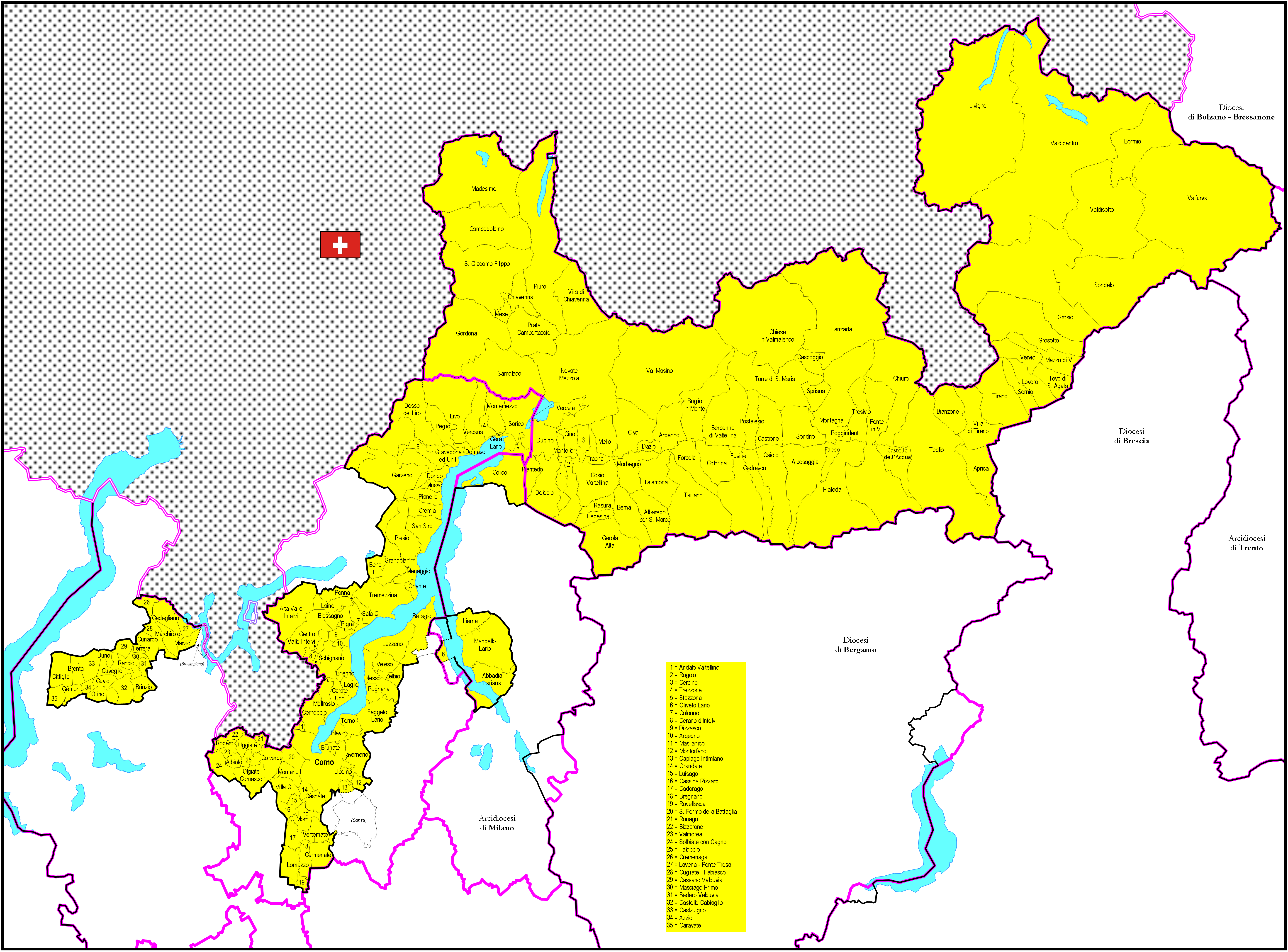 Mappa della Diocesi di Como